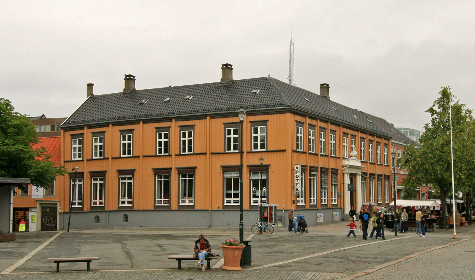 Svaneapoteket, Kongens gate 14 b, Trondheim. Oppført ca. 1775. Sterkt ombygd 1835. Fredet.